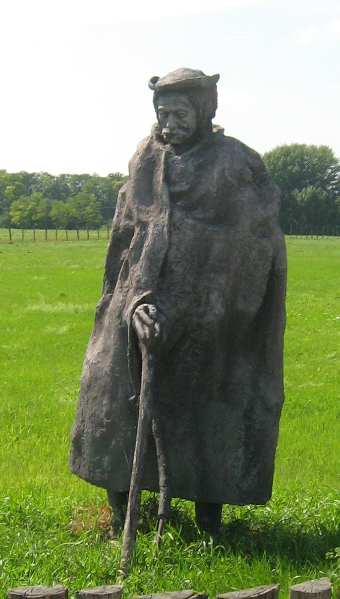 Mecsér-Rigópuszta, juhászszobor, Magyarország